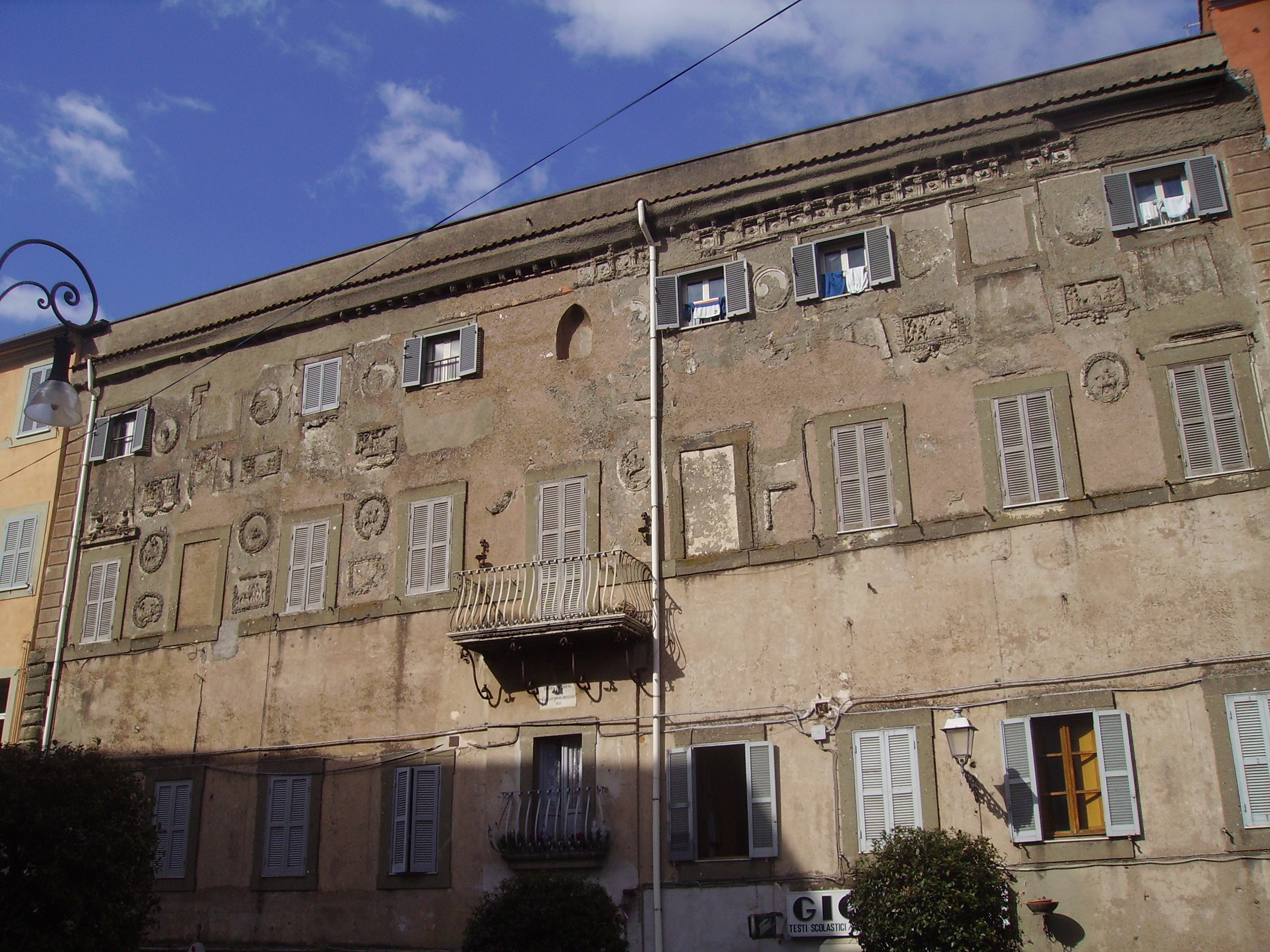 Palazzo Castagna a Marino